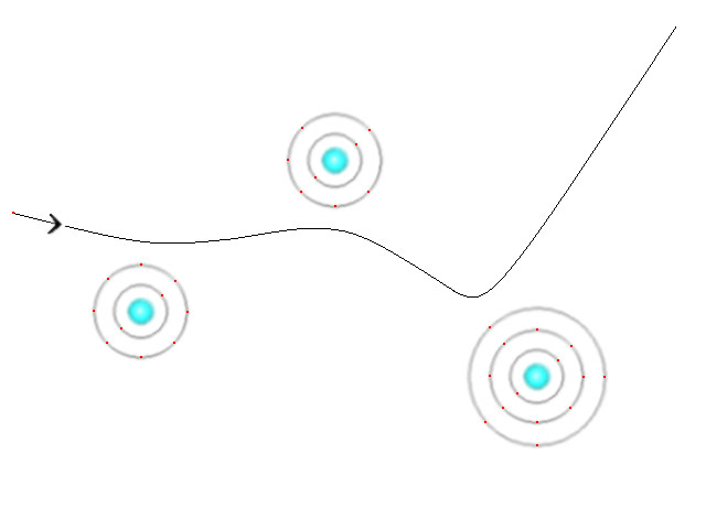 ベータ粒子の飛跡を描画したものです。矢印で示したものがベータ粒子の飛跡、マルで囲まれたものが原子です。